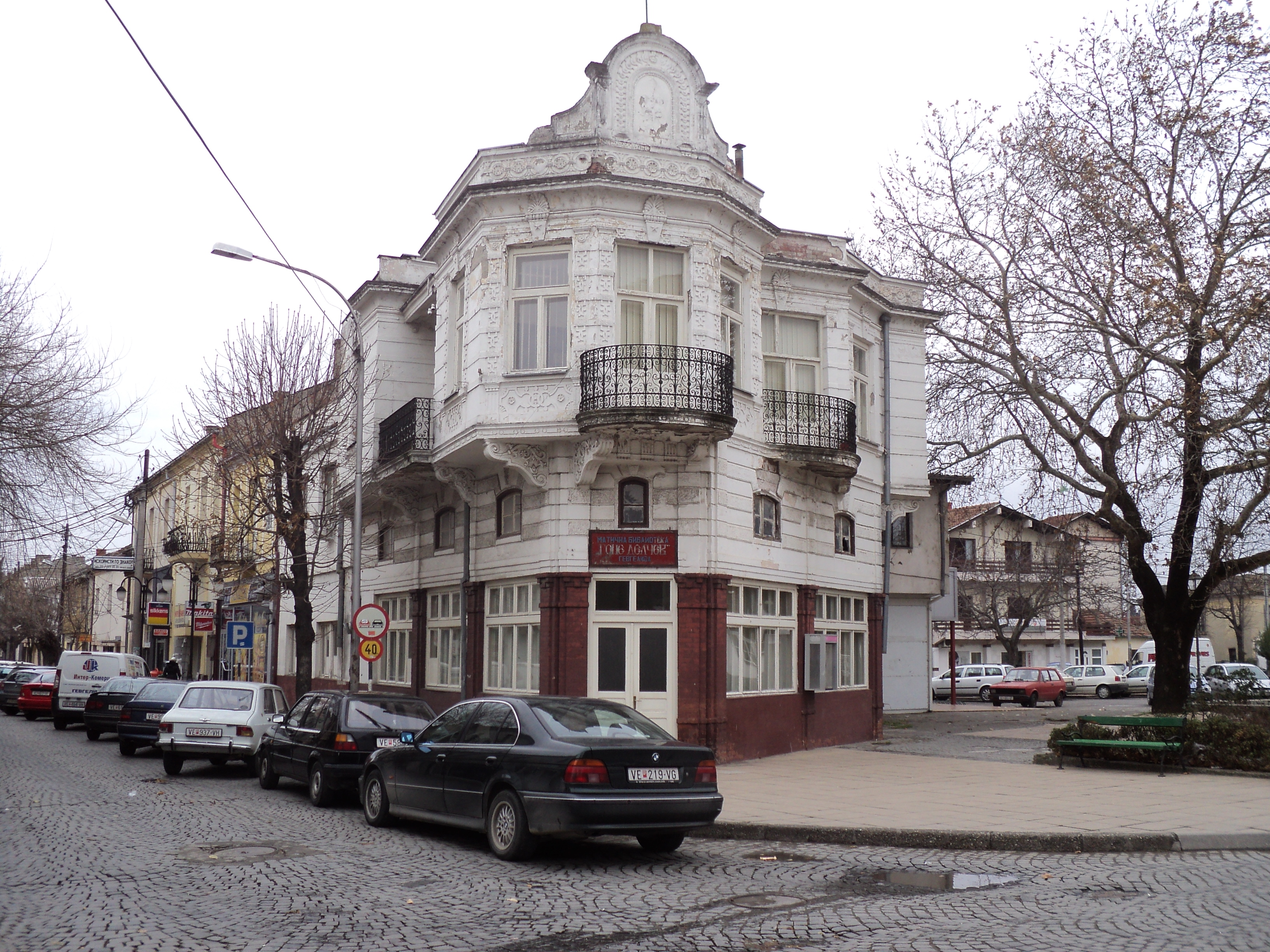 Градската Библиотека "Гоце Делчев" во град Гевгелија, Р.М.